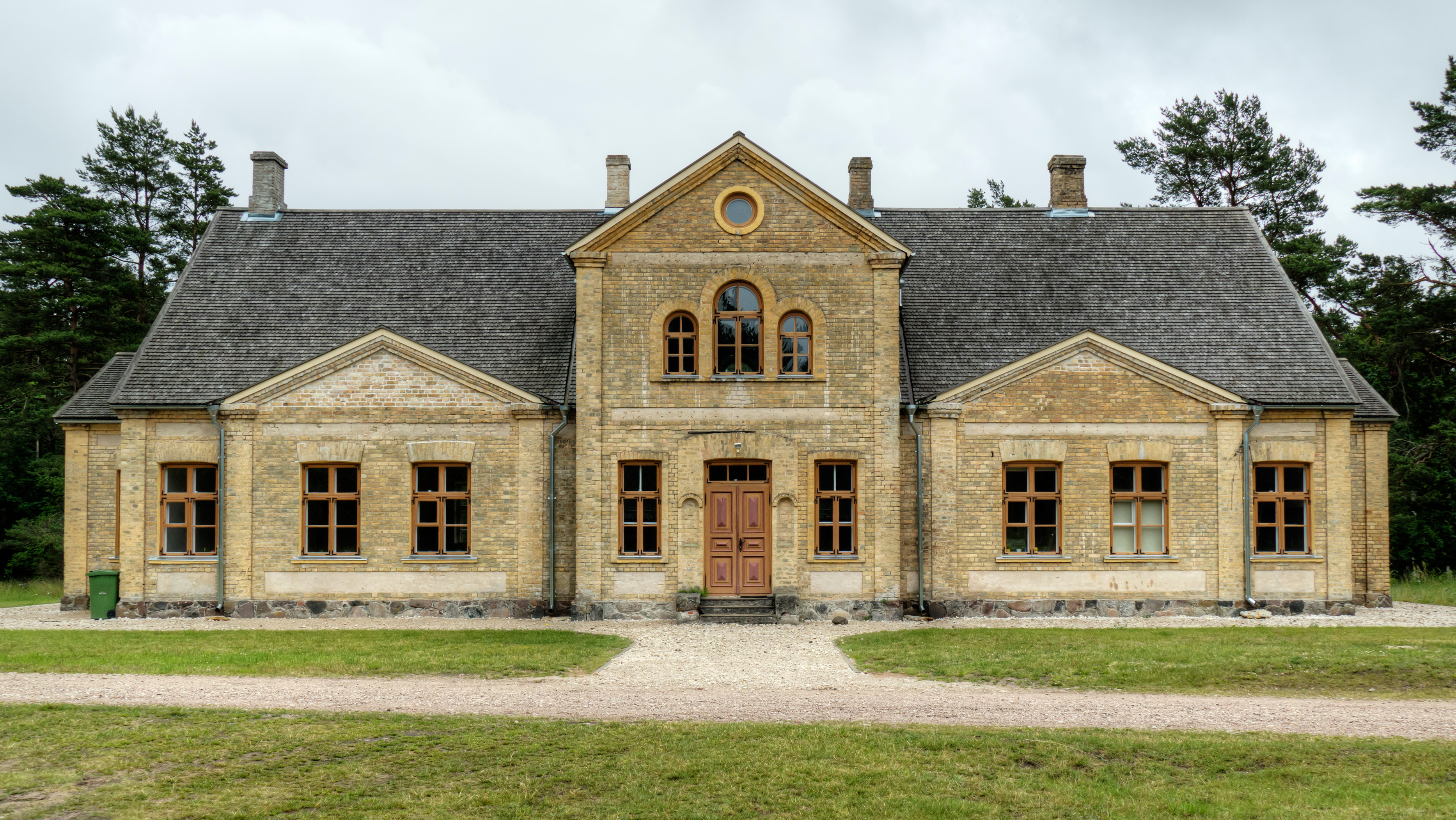 Kõpu õigeusu kirik-koolimaja, fassaadivaade